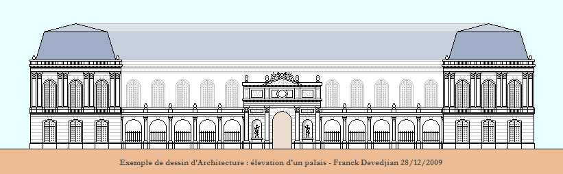 Description Exemple de dessin d'Architecture : élévation d'une façade d'un Palais Date28 December 2009Sourcesource personnelle à l'auteurAuthorFranck Devedjian franckdevedjian(at)hotmail(pt)com Exemple de dessin d'Architecture : élévation d'une façade d'un Palais